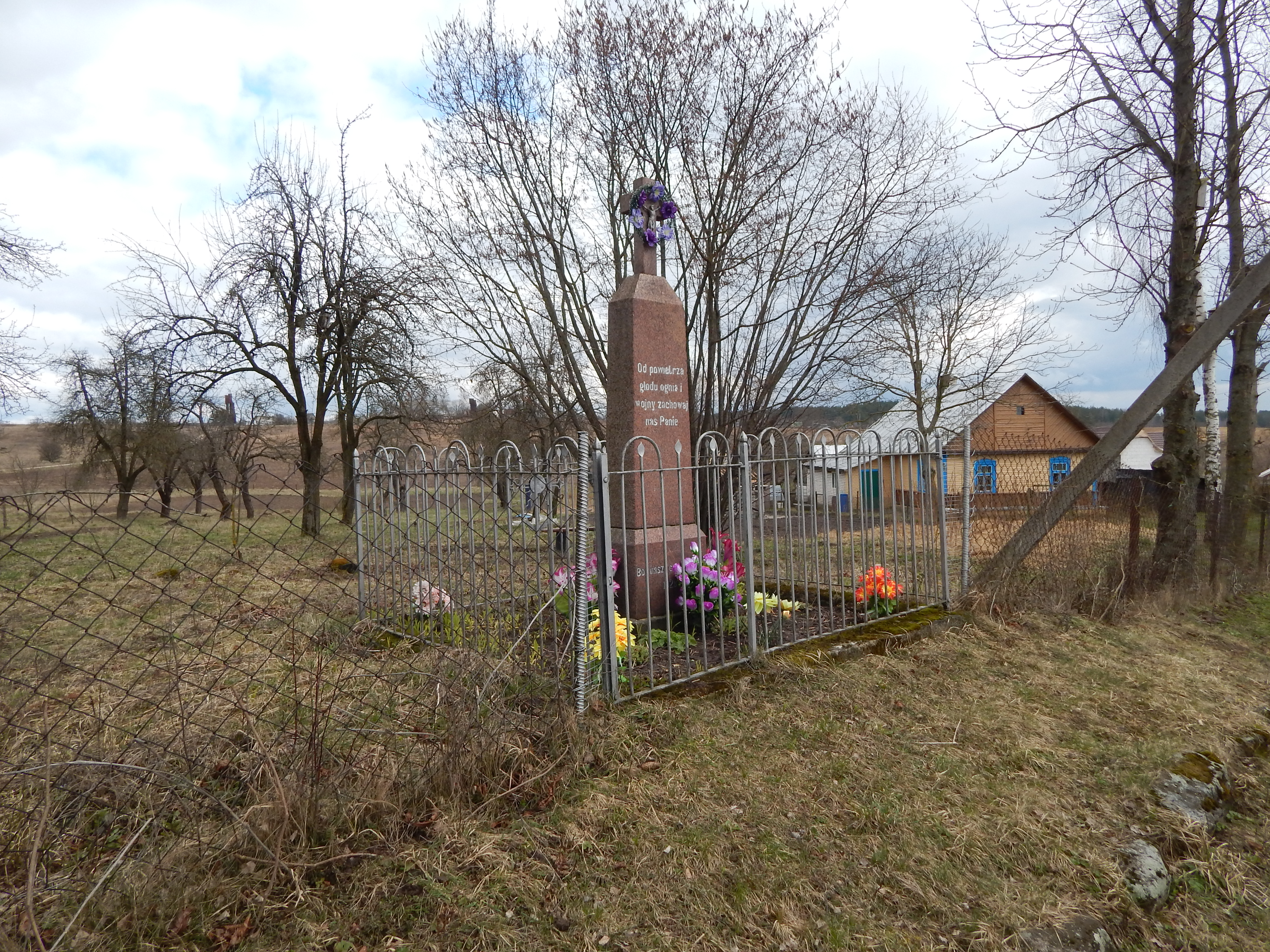 Фартыфікацыйныя збудаванні Гродзенскай крэпасці:земляны форт № 1земляны форт № 5земляны форт № 6форт № 1рэшткі форта № 1а (малы форт)сховішча апорнага пункта форта № 1арэшткі форта № 2рэшткі форта № 2а (малы форт)рэшткі сховішча апорнага пункта форта № 2арэшткі парахавога склепарэшткі форта № 3рэшткі форта № 3а (малы форт)рэшткі форта № 3а (парахавы склеп)форт № 3а (пазіцыя для 210-мм японскіх гармат)рэшткі форта № 3бфорт № 4форт № 4а (малы форт)парахавы склепфорт № 5форт № 5апарахавы склепрэшткі форта № 6два горжавыя бліндажы фортавай групы № 6тры сховішчы фортавай групы № 6рэшткі форта № 7парахавы склеп фортавай групы № 7_412Д000677 This is a photo of Belarusian heritage monument. Reference number: 412Д000677 ( WLM)